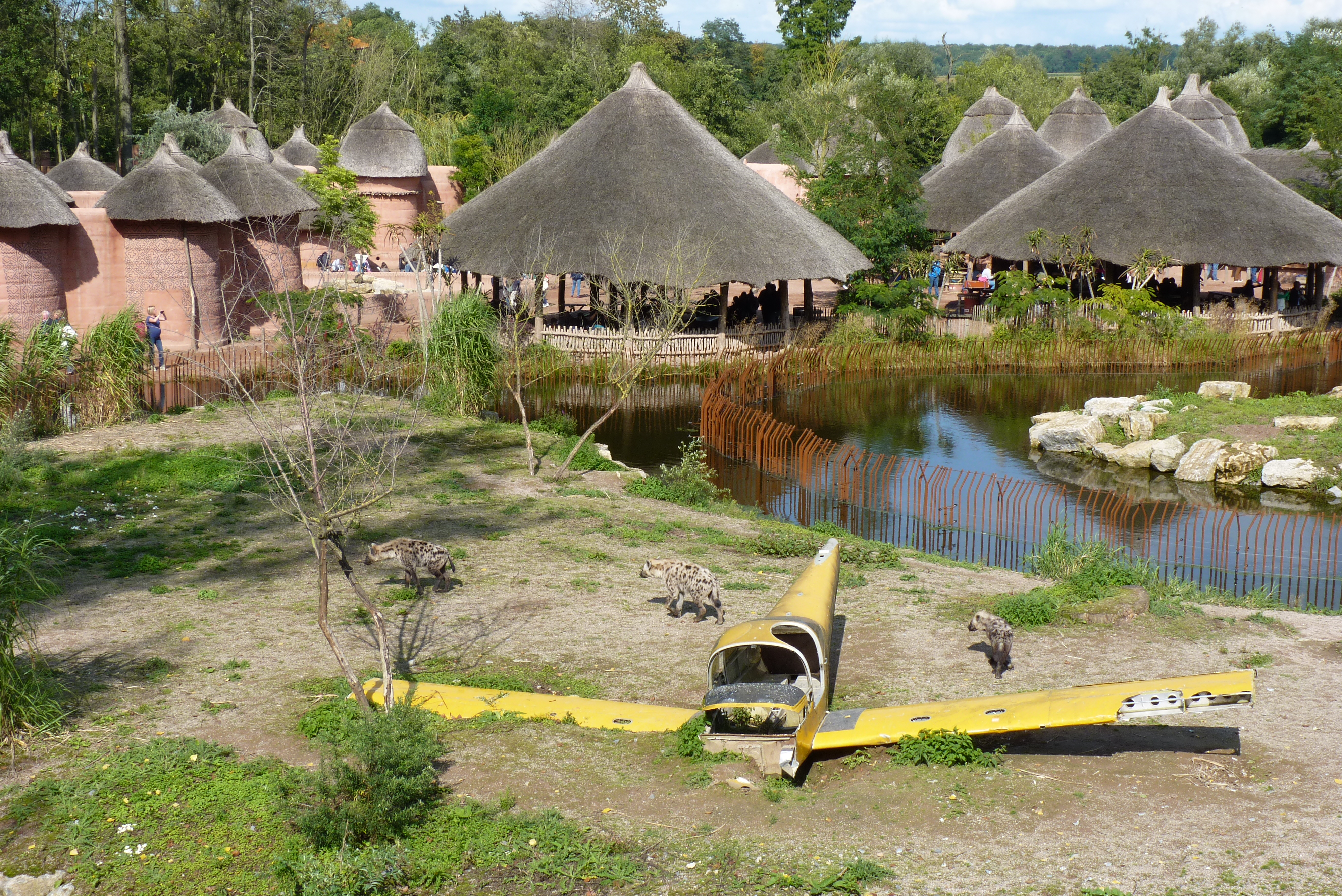 Пайри Дайза 2014, африканская деревня